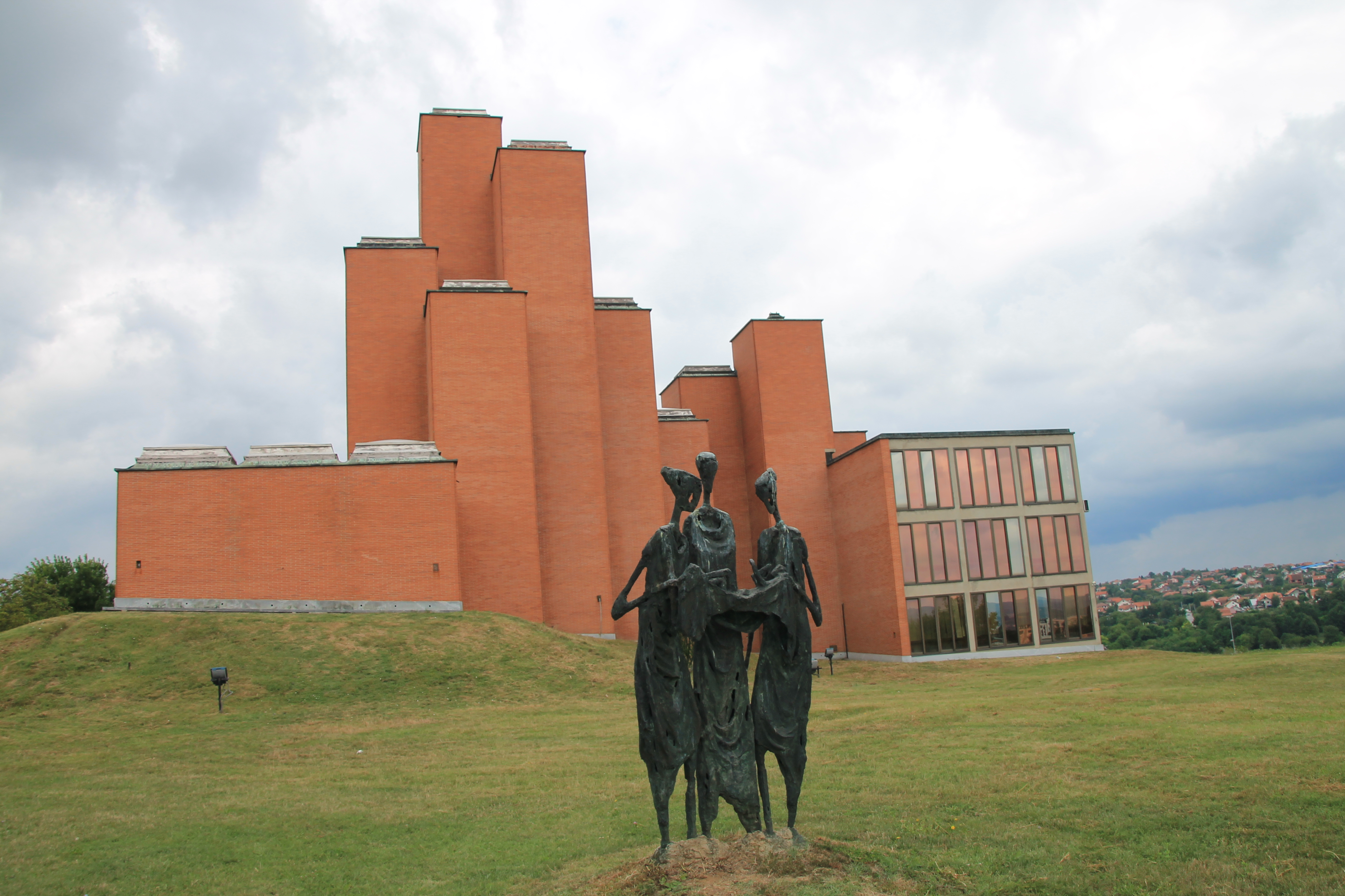 Spomen muzej 21 oktober